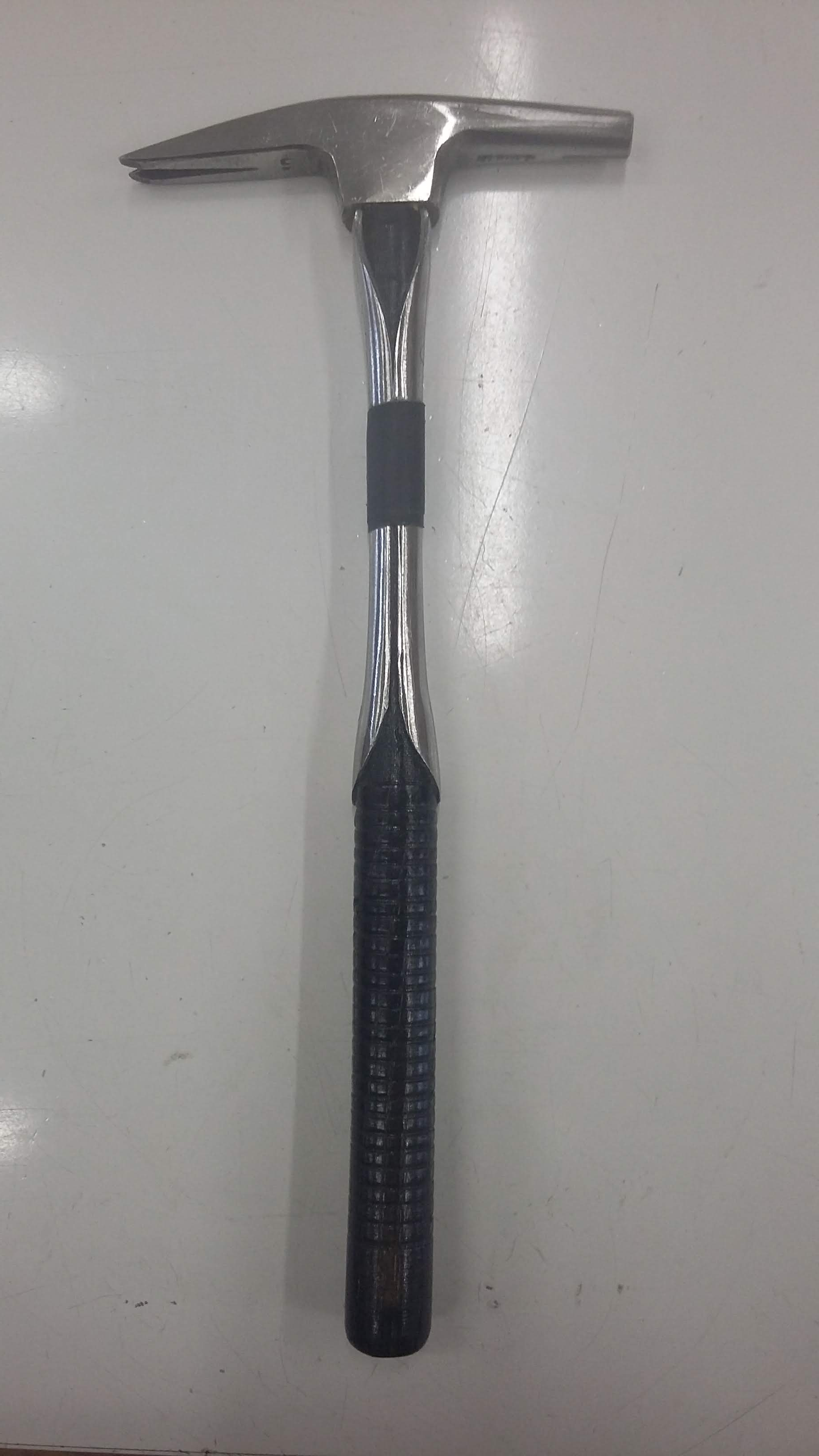 Ramponneau de tapisserie